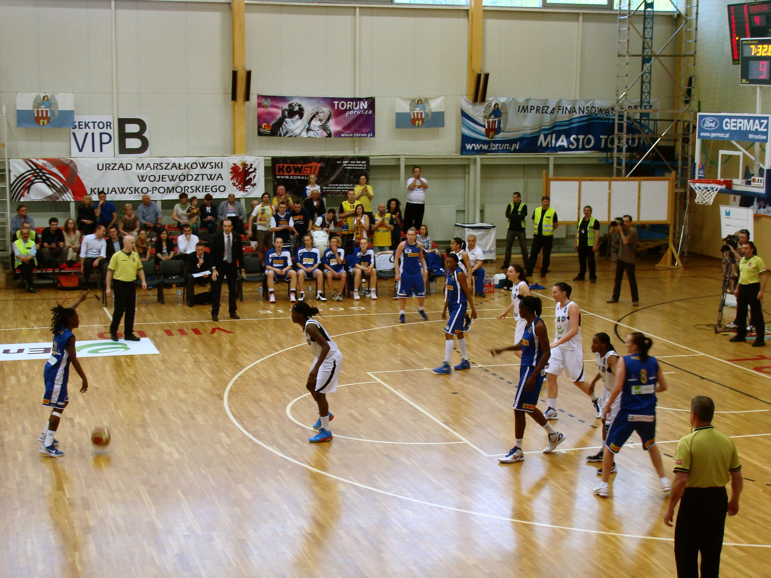 Mecz o 3. miejsce PLKK Katarzynki Energa Toruń - Lotos Gdynia